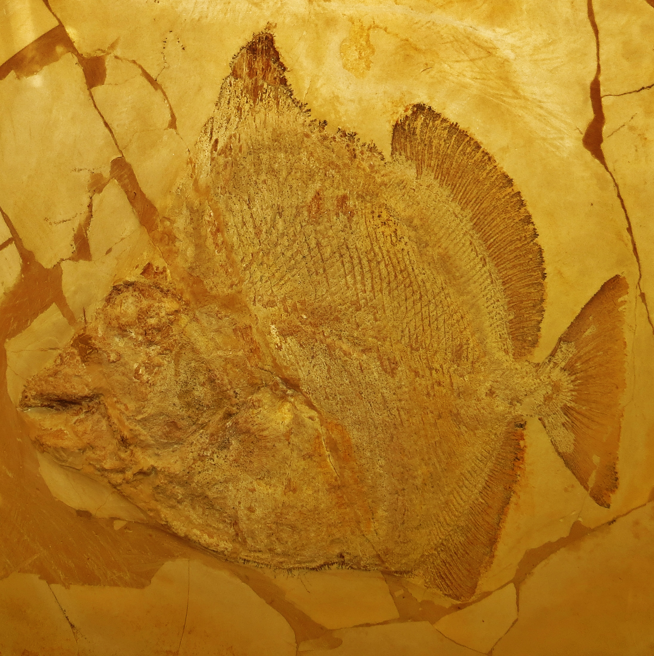 Took the picture at Museum Berger, Eichstaett